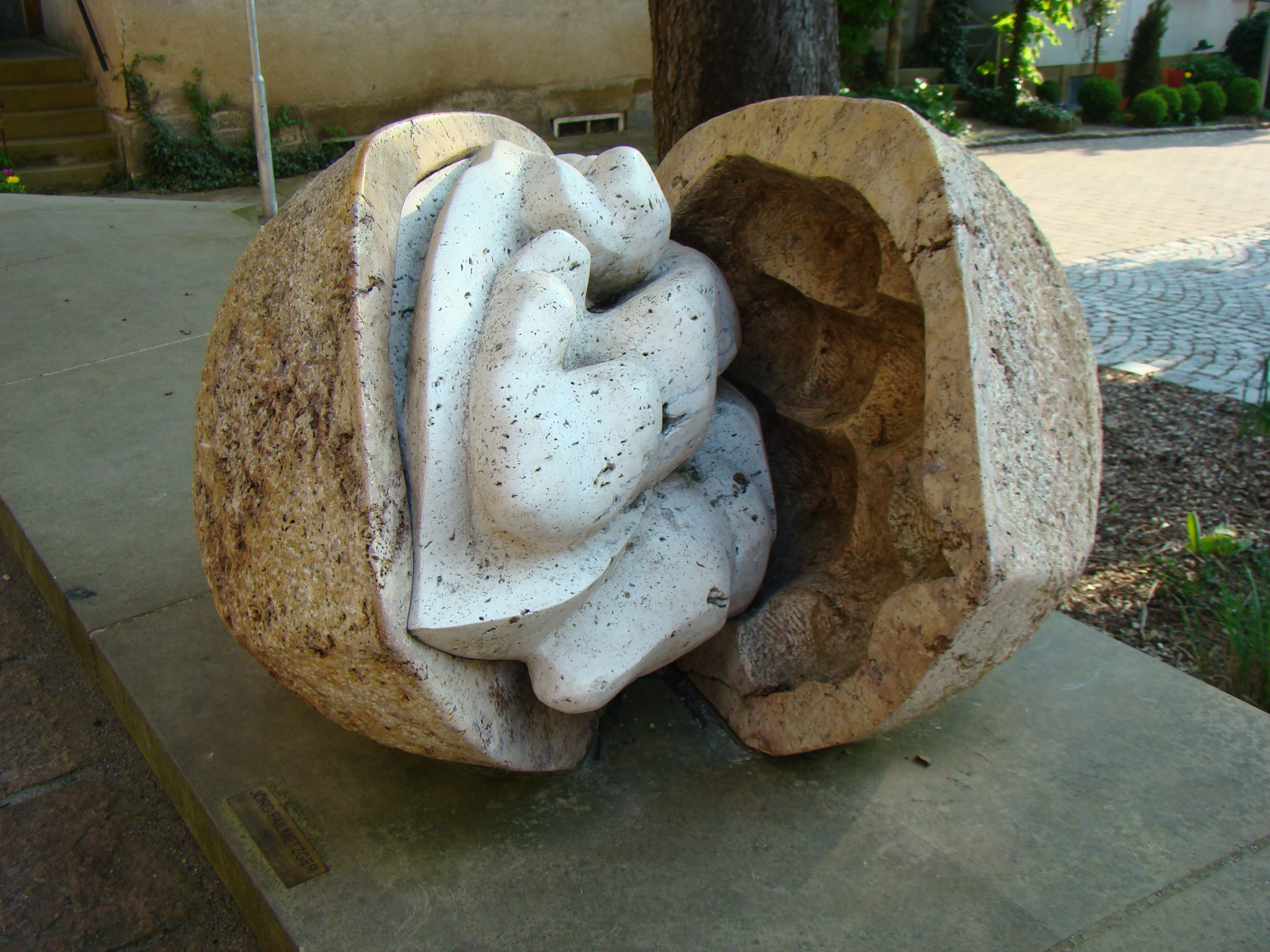 Skulptur (1997) von Jörg Failmetzger in Güglingen